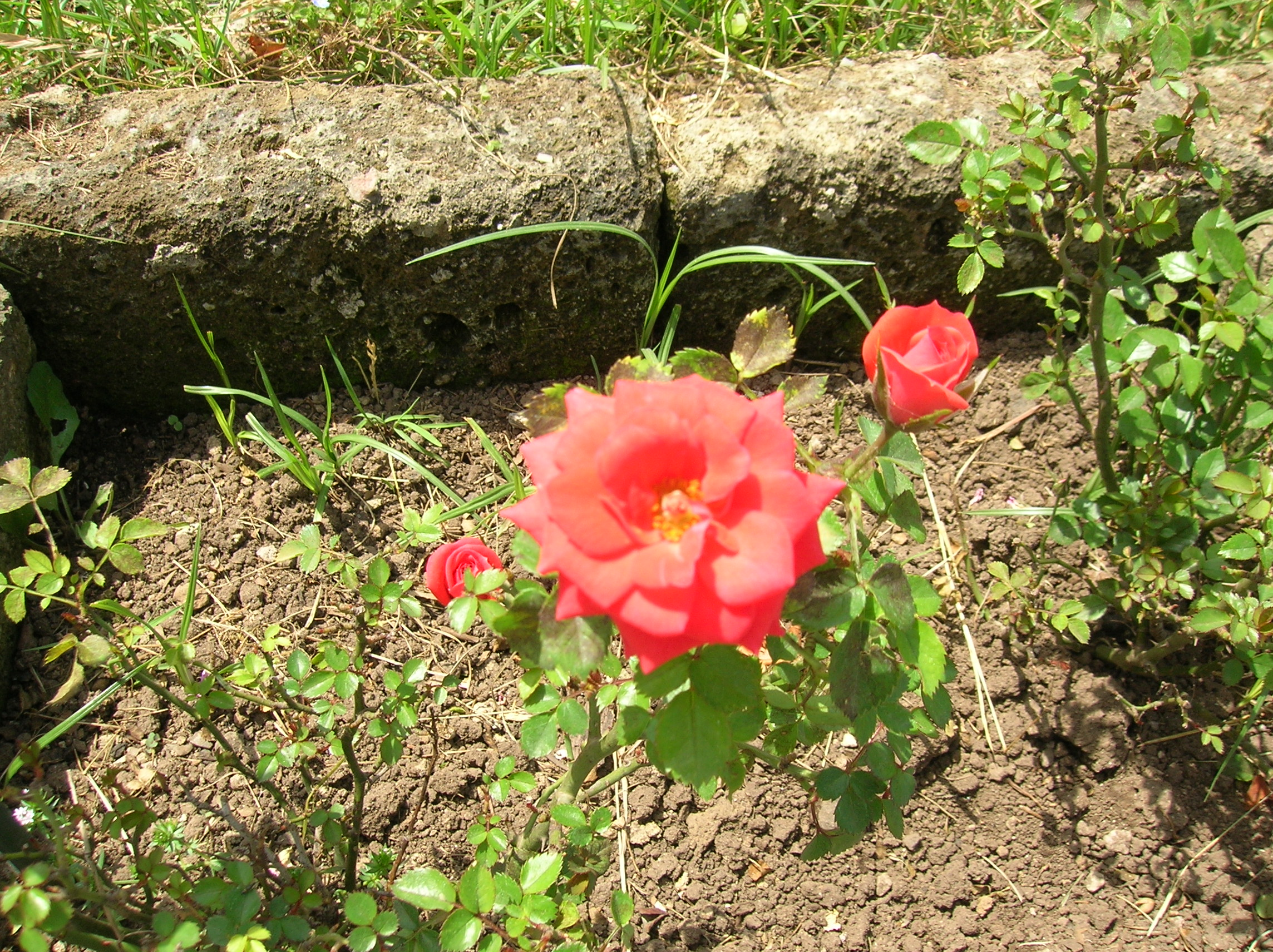 Rosa Shrimp Hit - Poulsen - 1991 (Danimarca).JPG